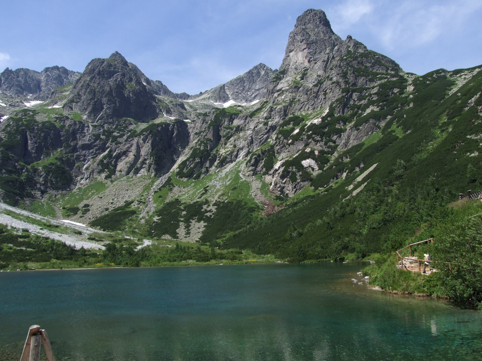 Zielony Staw Kieżmarski w Tatrach iwznoszące się nad nim turnie:Czarny Szczyt i Jastrzębia Turnia. Pomiędzy nimi Jastrzębia Dolina, w głębi Kołowy Szczyt. Po lewej stronie Czarnego Szczytu Dzika Dolina